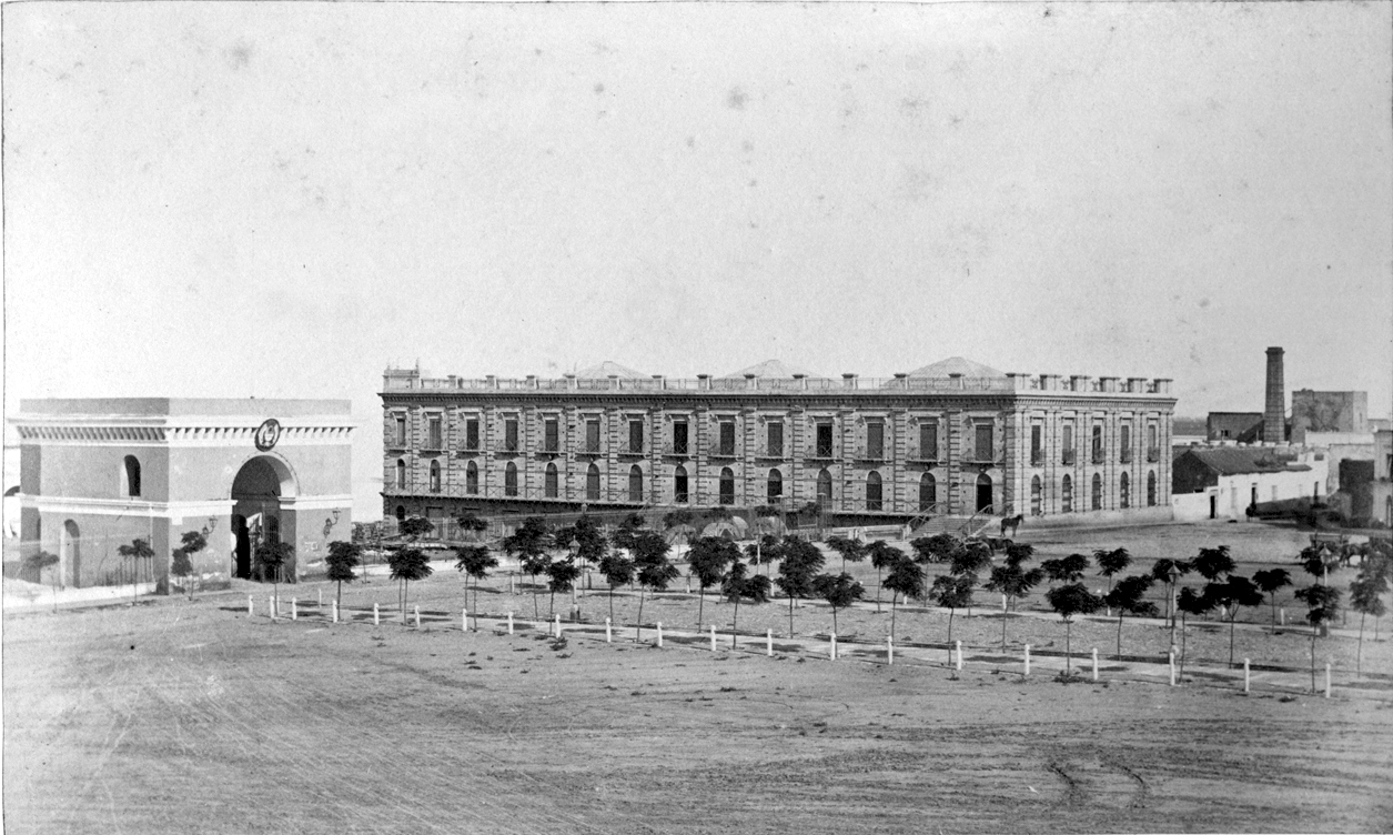 Edificio de la Administración de Rentas Nacionales, Buenos Aires, Argentina. A la izquierda puede verse el viejo Fuerte de la Ciudad. A la derecha, asoma la chimenea del Molino Harinero San Francisco.